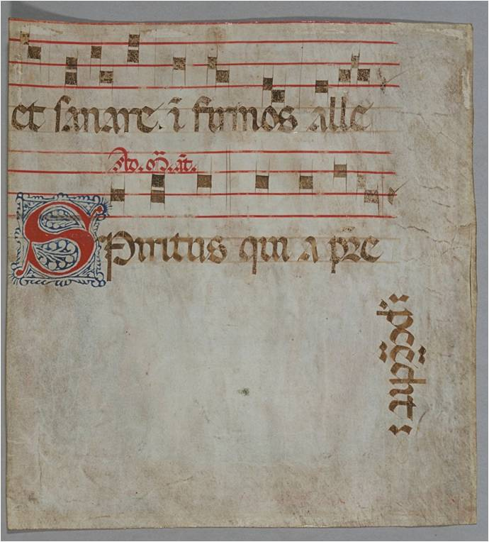 Неизвестный средневековый художник, около 1400 года. Подлинная средневековая миниатюра NY, Columbia Univ., Plimpton Add. MS 18 (dorse) с нотным текстом на обороте миниатюры Испанского фальсификатора с изображением шахматистов.